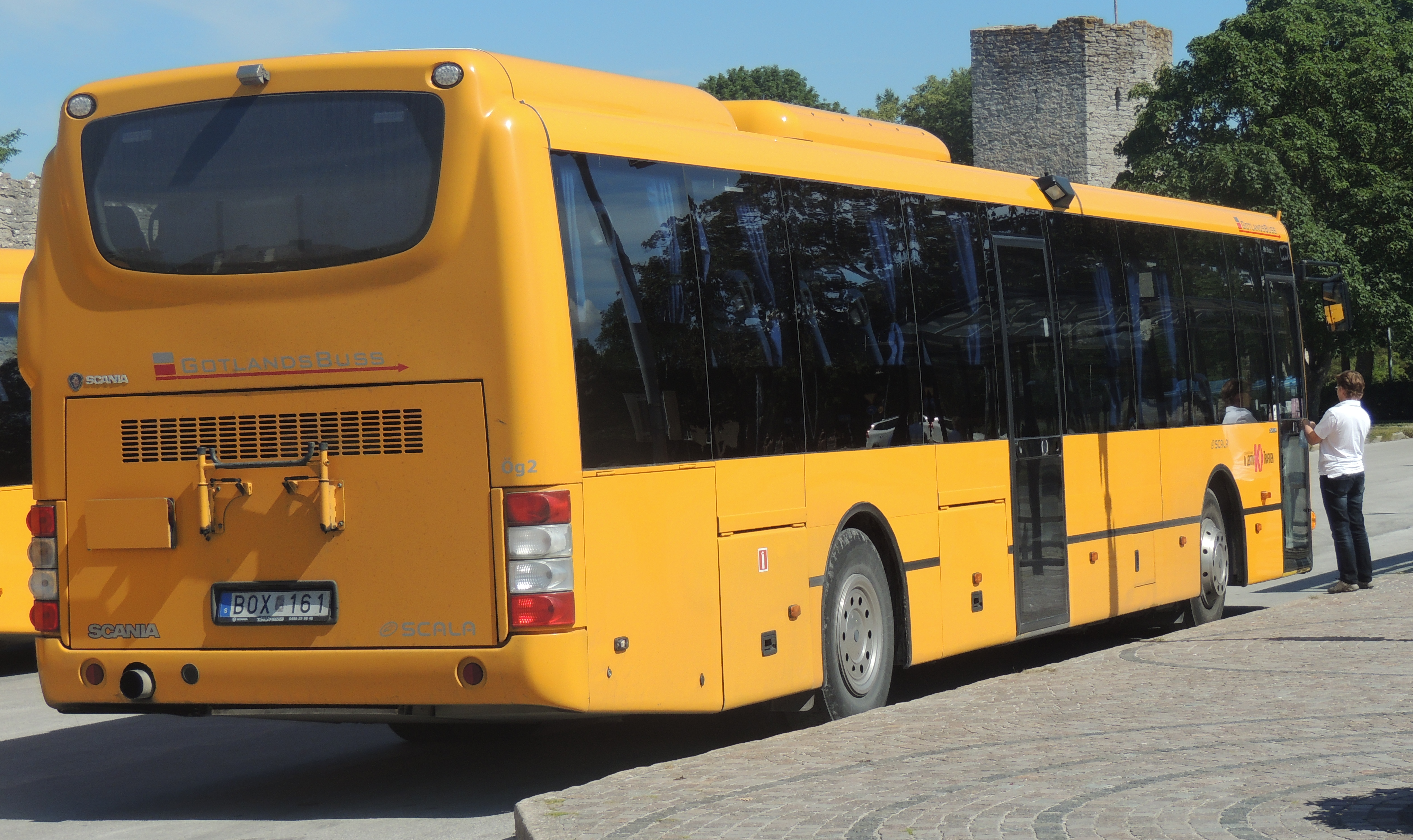 En Kollektivtrafiken (Gotland)-buss stående på Visby bussterminal.